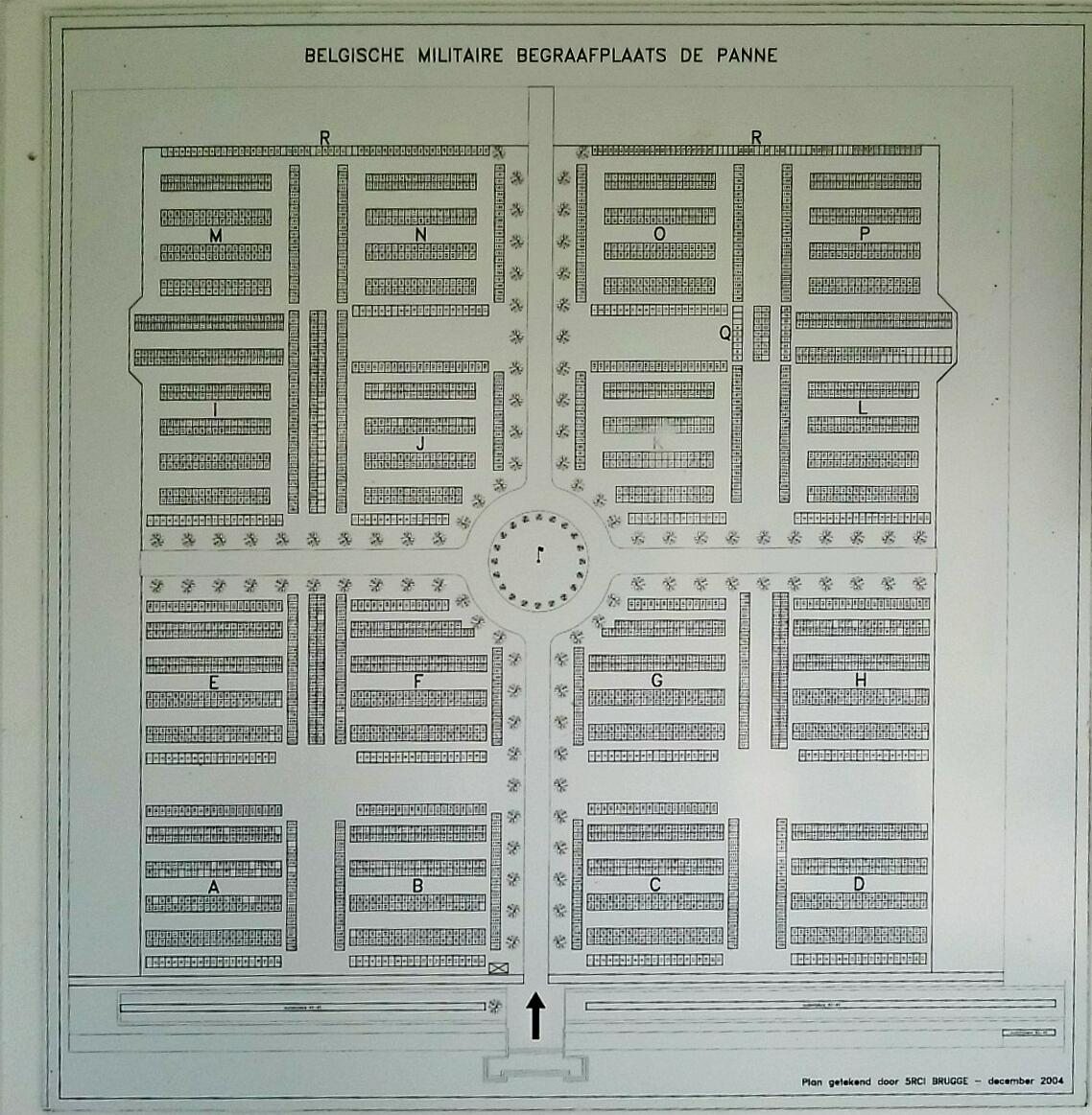 Plan des tombres du Cimetière militaire belge de La Panne.